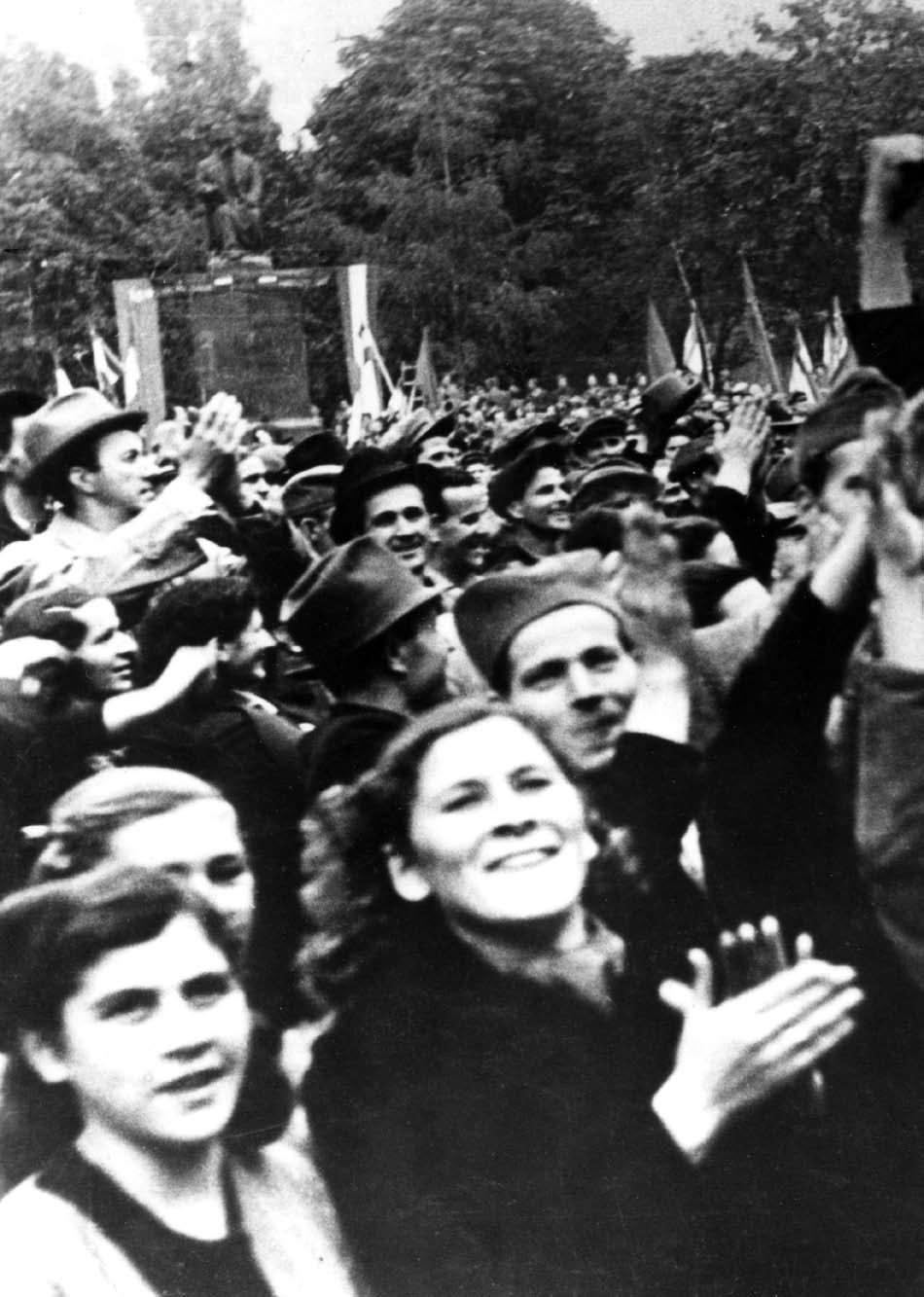 Srpskohrvatski / српскохрватски: Narod slavi oslobođenje Beograda oktobra 1944